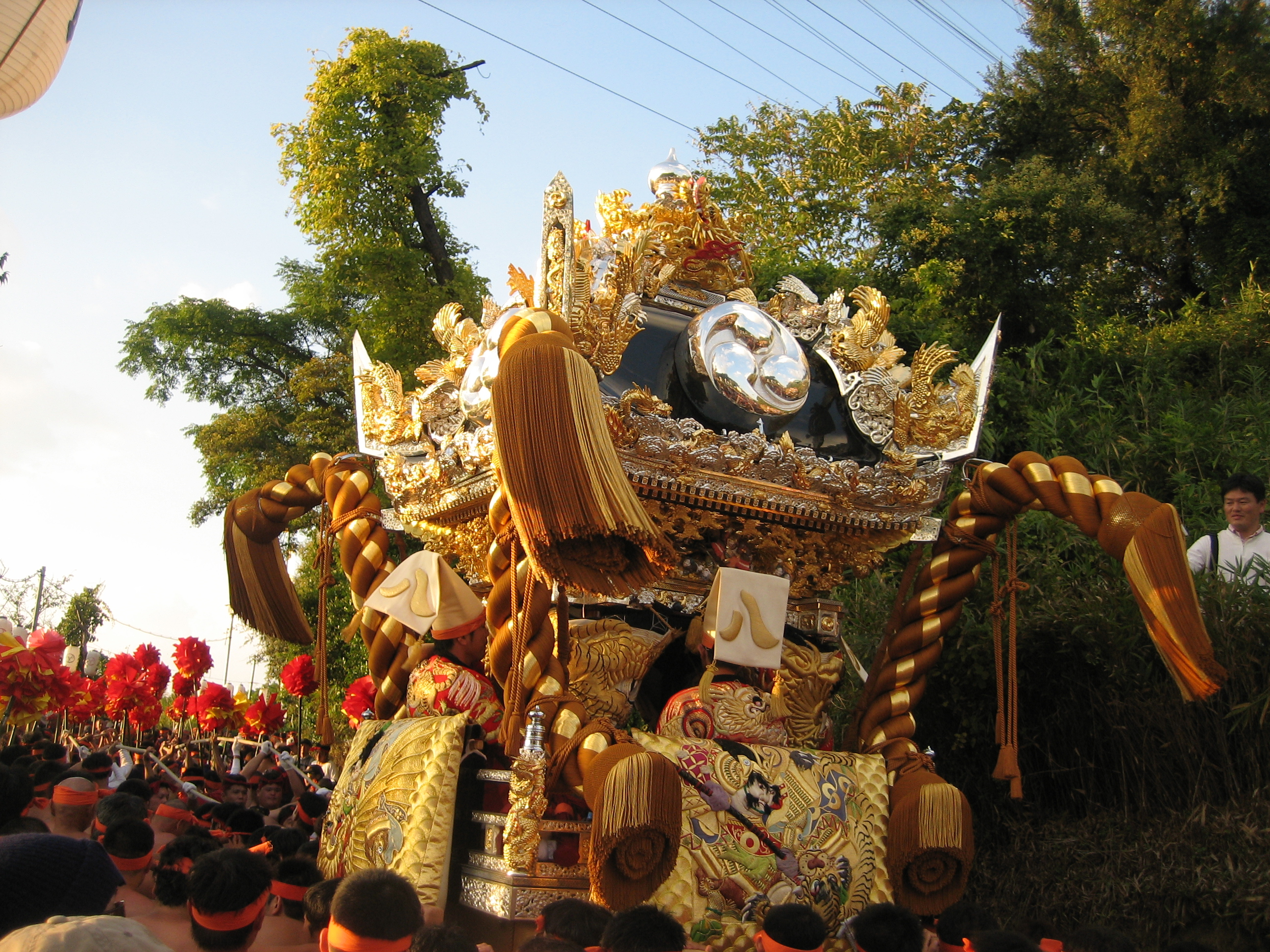 御旅山を登っていく旧 八家村の屋台。夕刻頃撮影。